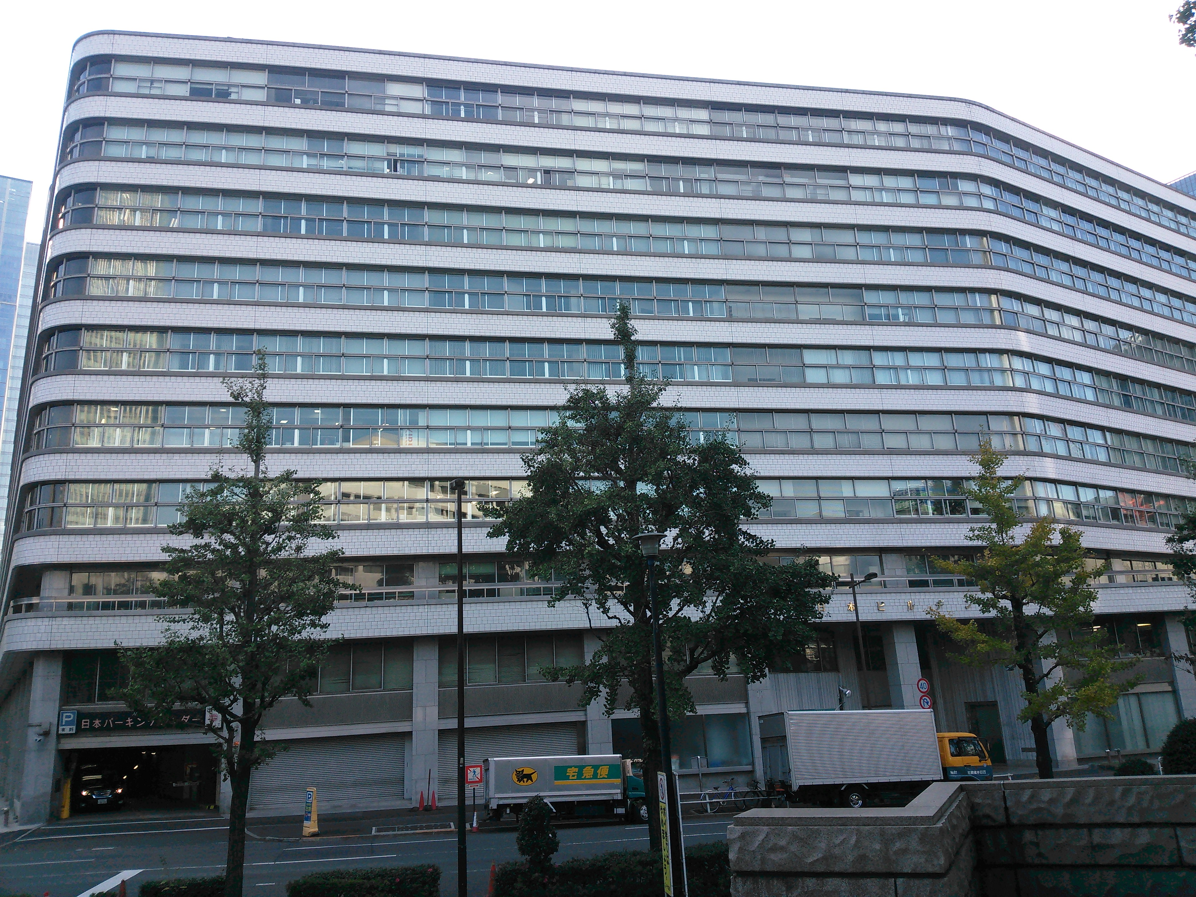 東京都千代田区大手町、日本ビルヂング。1階左側に日本パーキングセンター入口